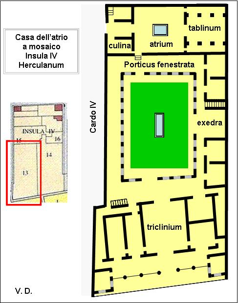 Casa dell'atrio a mosaico, insula IV, Ercolano